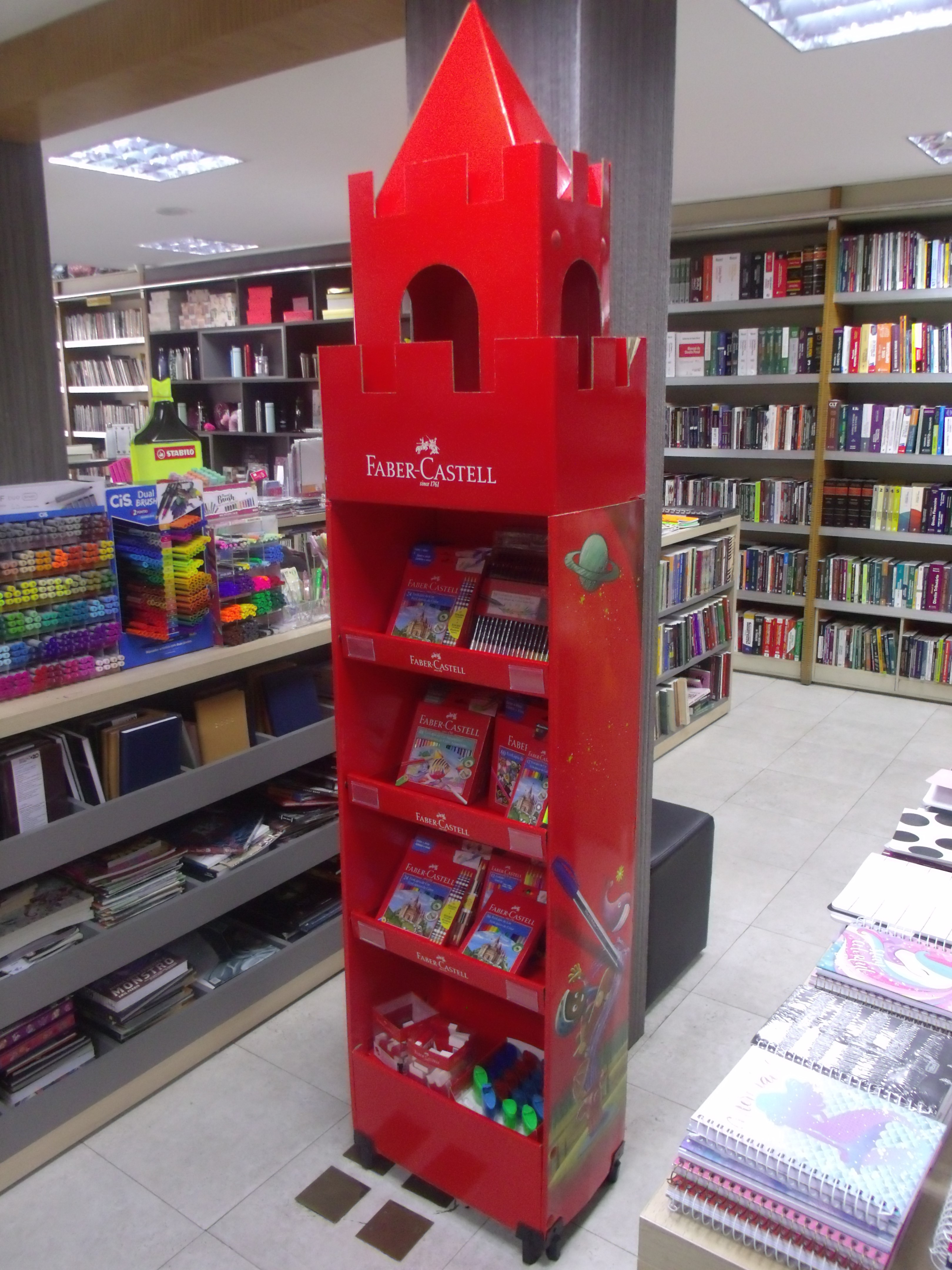 Stand da Faber-Castell numa livraria em Teresina, Piauí, Brasil.